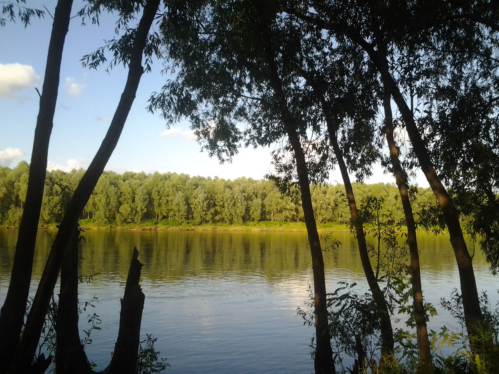 Десна